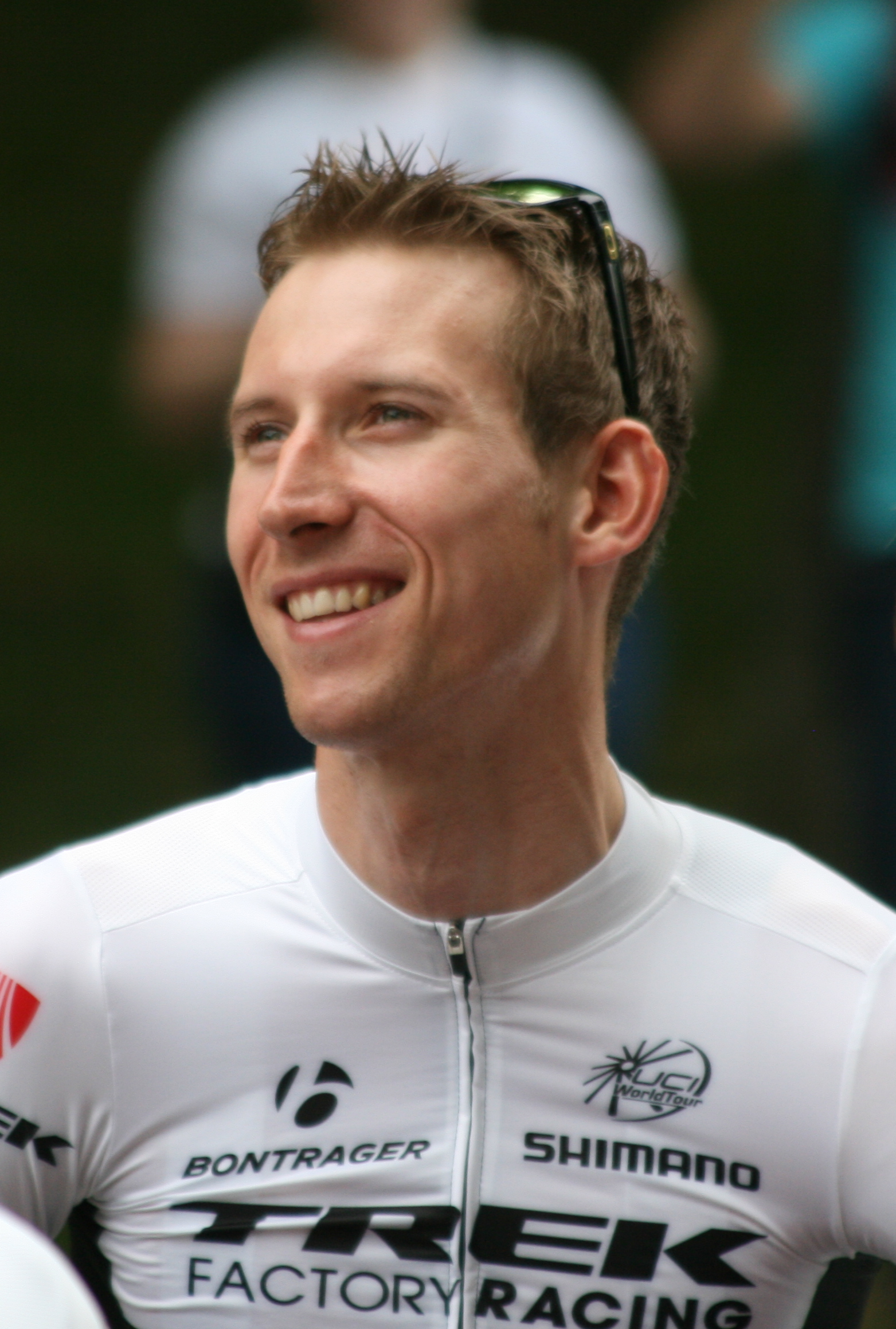 ploegenpresentatie Tour de France 2015 Utrecht